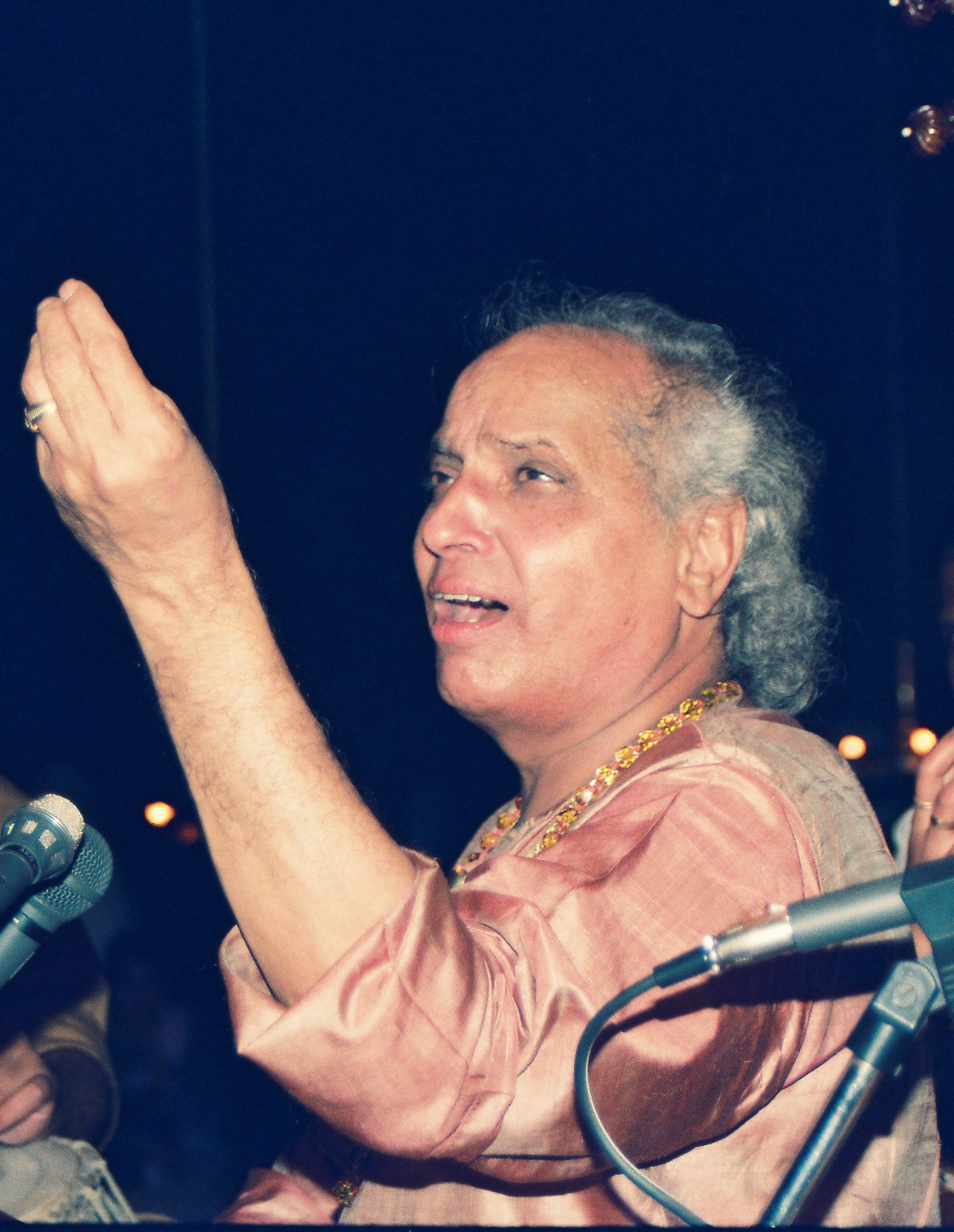 പണ്ഡിറ്റ് ജസ്​രാജ്